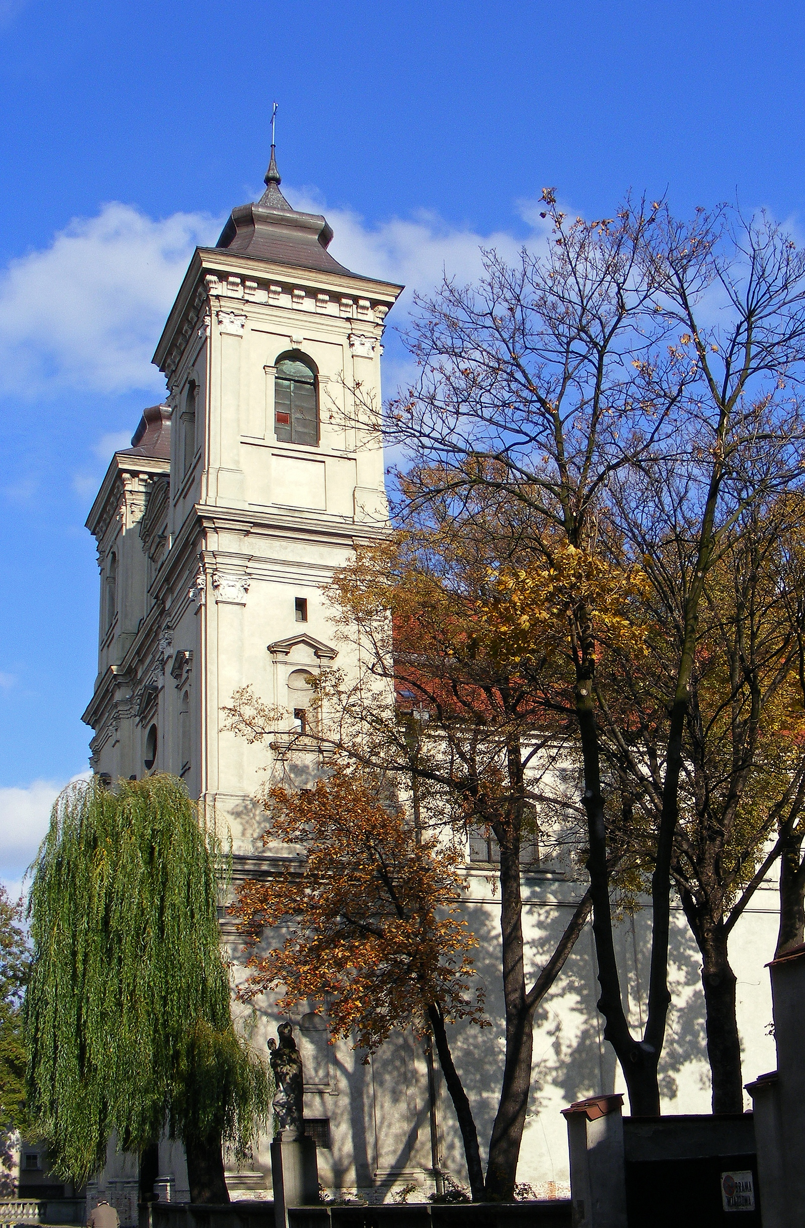 Leszno, ul. Kościelna 18 - kościoł parafialny pw. św. Mikołaja: kościół z lat 1688-1691